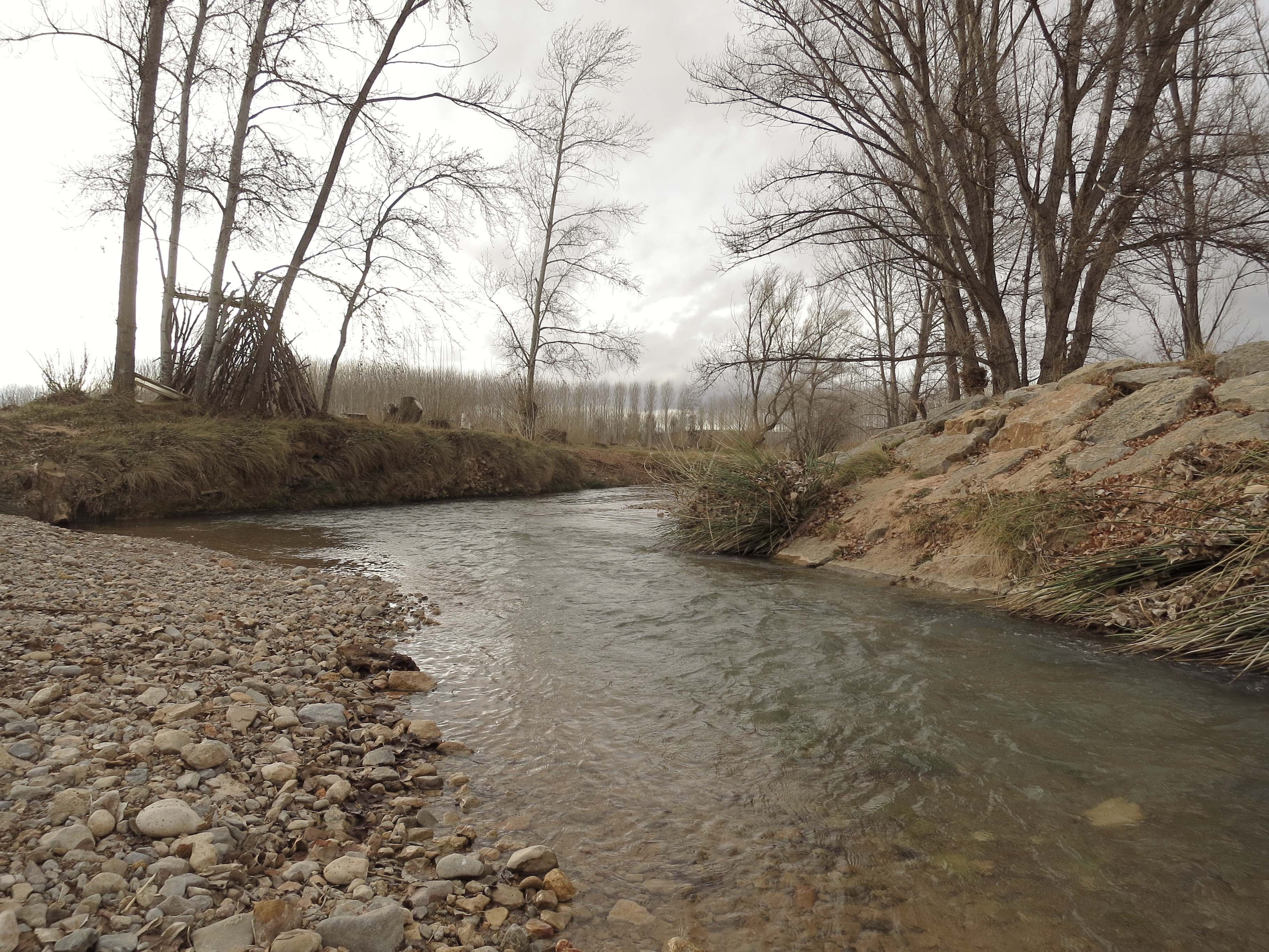 Teruel (Aragón, España) - Confluencia del Alfambra con una rambla desconocida cerca de la autovía Mudejar.